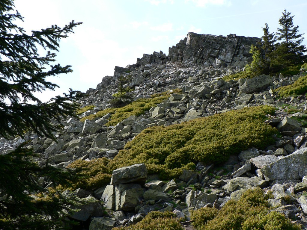 Pohled na Ztracené kameny odspoda